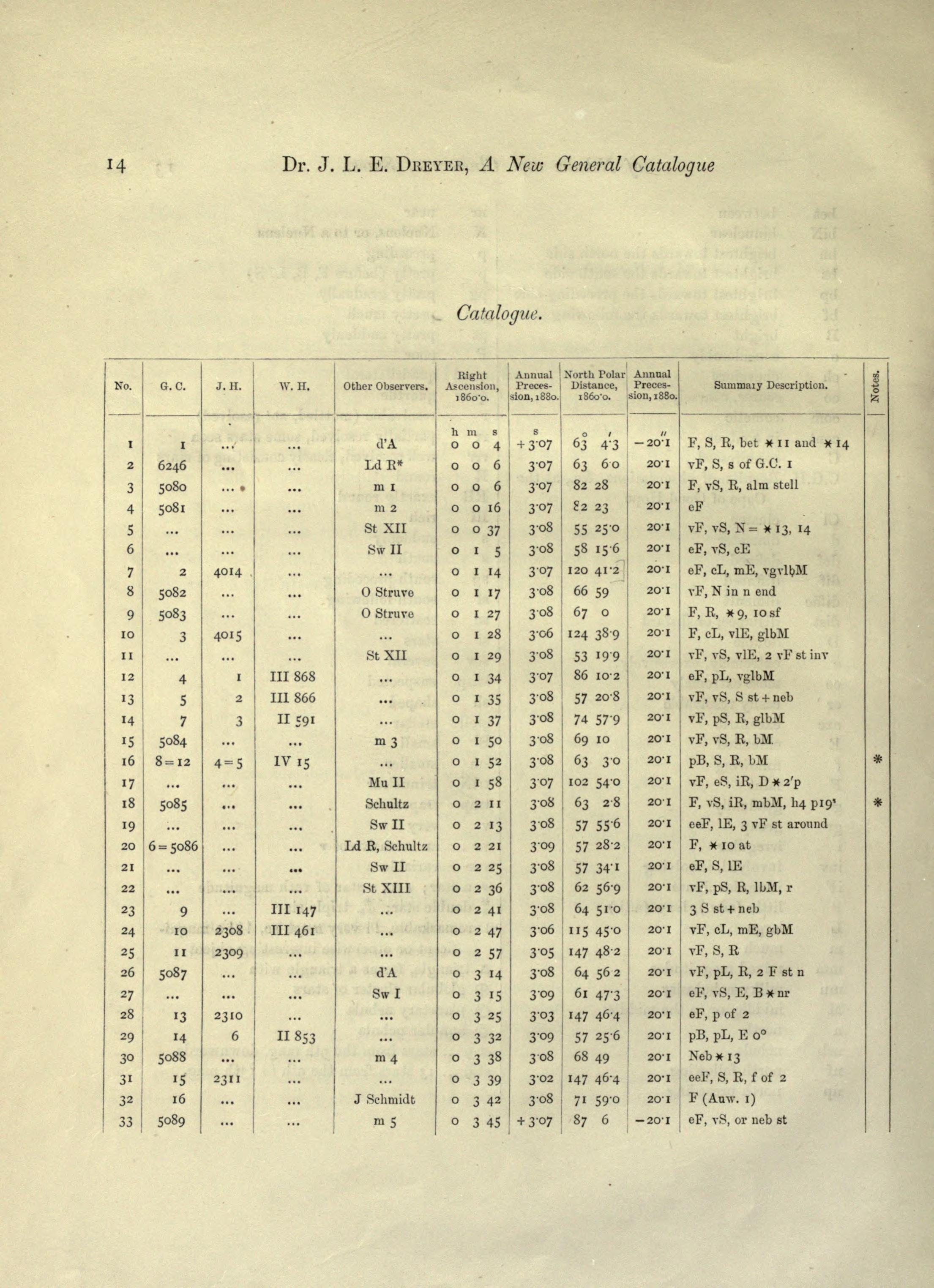 Erste Katalog-Seite aus dem "New General Catalogue" von John Ludvig Emil Dreyer: NGC 1 bis NGC 33. "No.": Fortlaufende Nummer im NGC. "G.C.": Nummer in "General Catalogue" von John Herrschel (1-5079) oder der ersten Erweiterung von Dreyer (5080-6251) "J.H.": Nummer der Slough Beobacthungen in Phil. Trans und seiner Beobachtungen vom Kap. "W.H.": Klassifikation und Nummer von William Herrschel aus den Beobachtungen von 1786, 1789, 1802. "Other Obervers.": Weitere Beobachter des Objekts. Häufig auftretende Namen wurden von Dreyer abgekürzt, z.B: "d'A für d'Arrest, Auw. für Auwers." "Right Ascension, 1860": Rektaszension für die Epoche 1860 "Annual Precession, 1880": Jährliche Präzession der Rektaszension im Jahre 1880 "North Polar Distance 1860": Entfernung vom Nordpol in Winkelgrad für die Epoche 1860 "Annual Precession, 1880": Jährliche Präzession der Deklination im Jahre 1880 "Summary Description": In dieser Spalte werden in Kurzform die wesentliche Eigenschaften des Objekts angeben (Helligkeit, Größe, Form, besondere Merkmale)